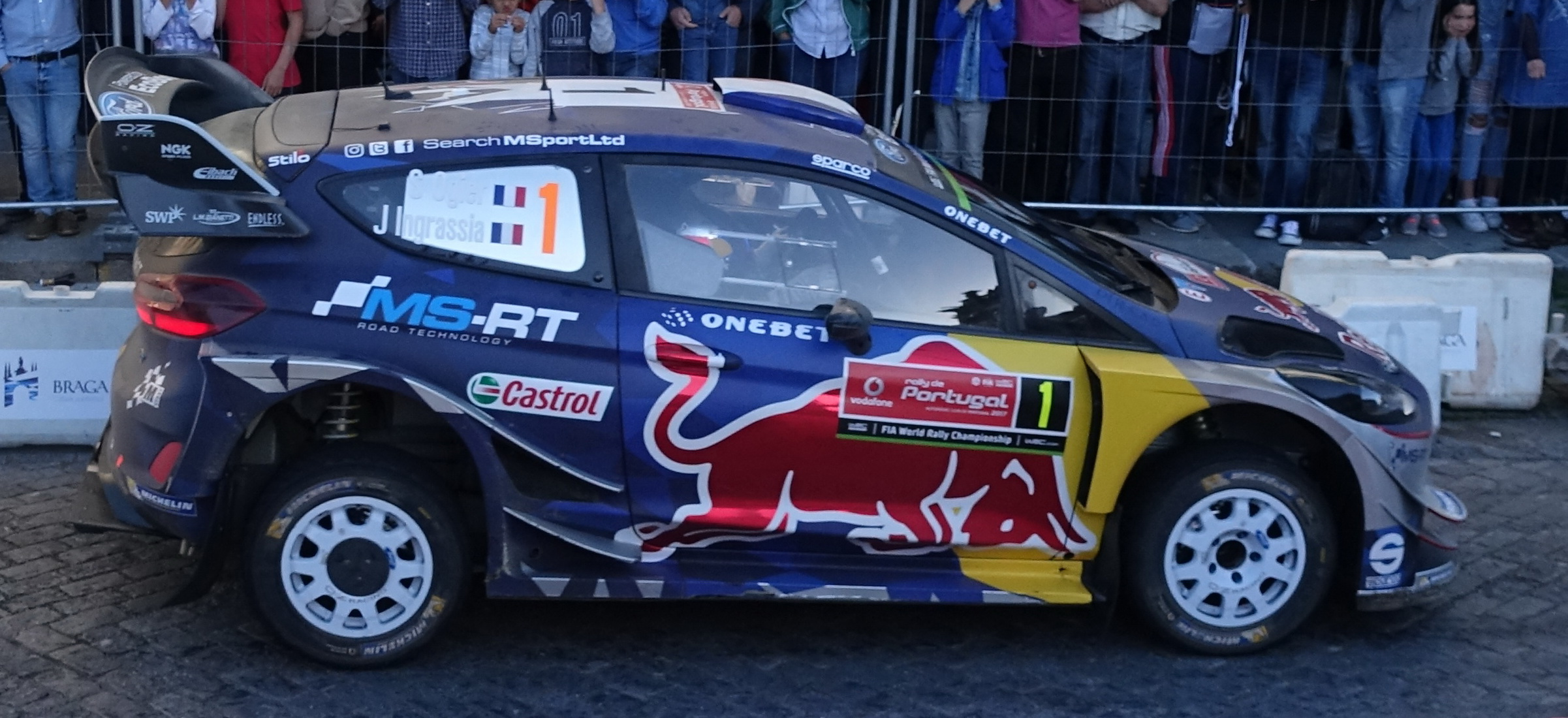 2017 Rally Portugal in Campo das Hortas, Braga, Portugal.